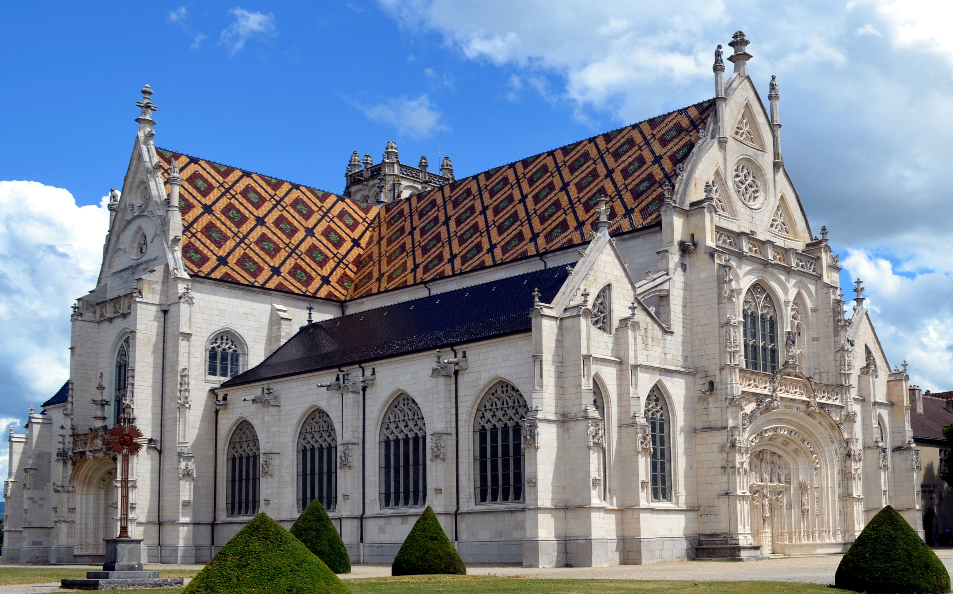 Monastère royal de Brou (église Saint-Nicolas-de-Tolentin de Brou).